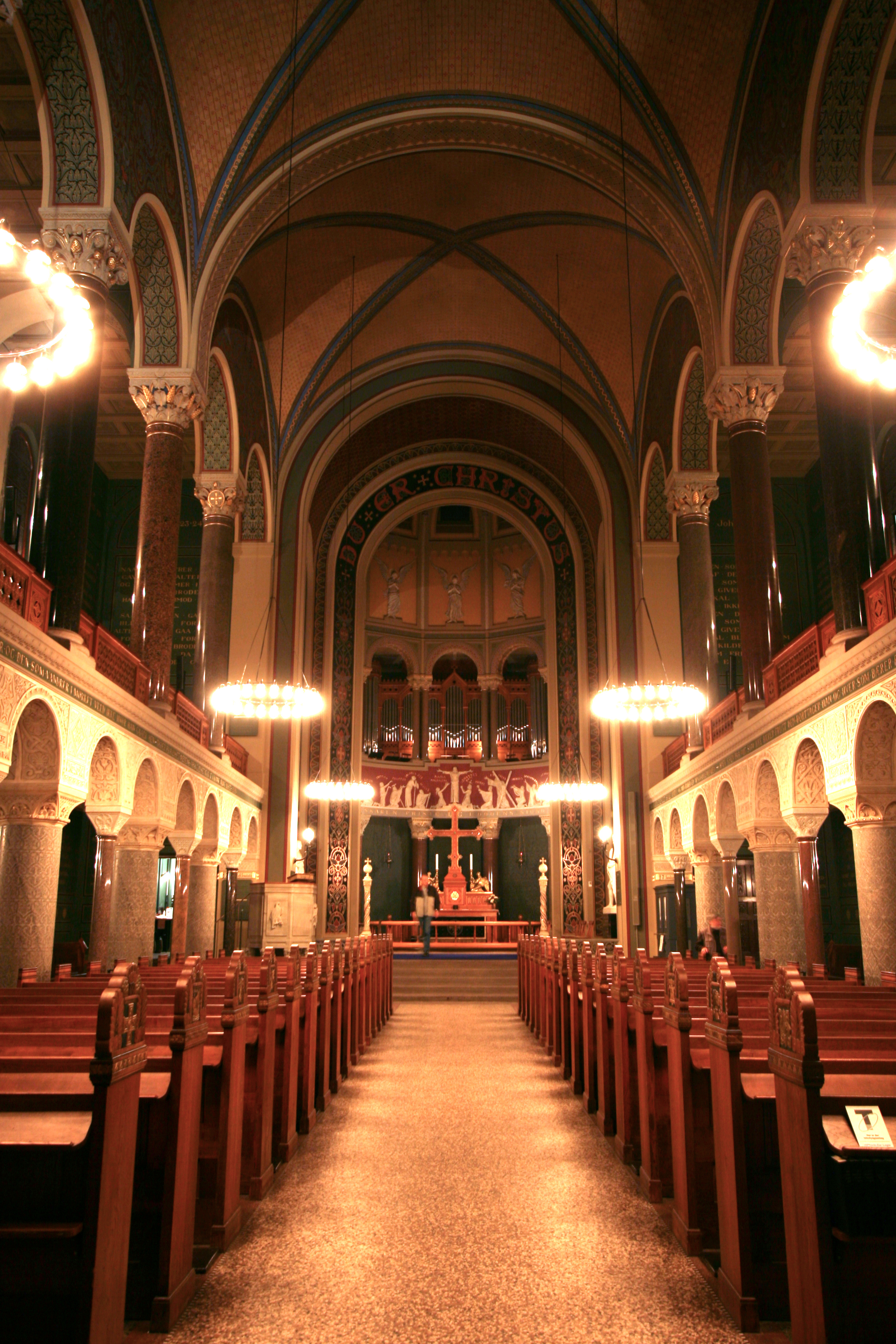 Jesuskirken, Valby, Copenhagen, Denmark Interior. Portrait format.